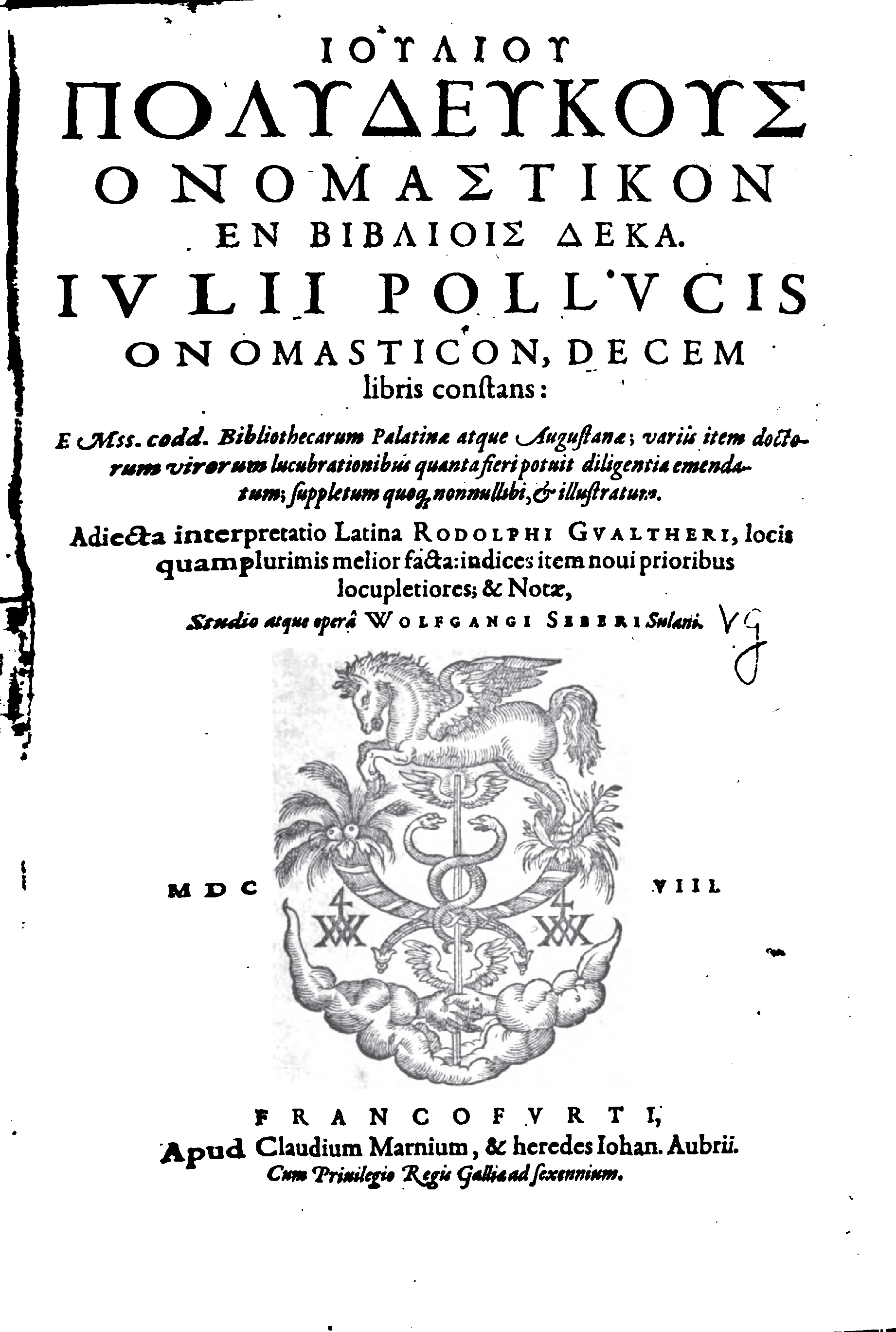 Юлий Поллукс. Ономастикон Титульный лист издания 1608 года